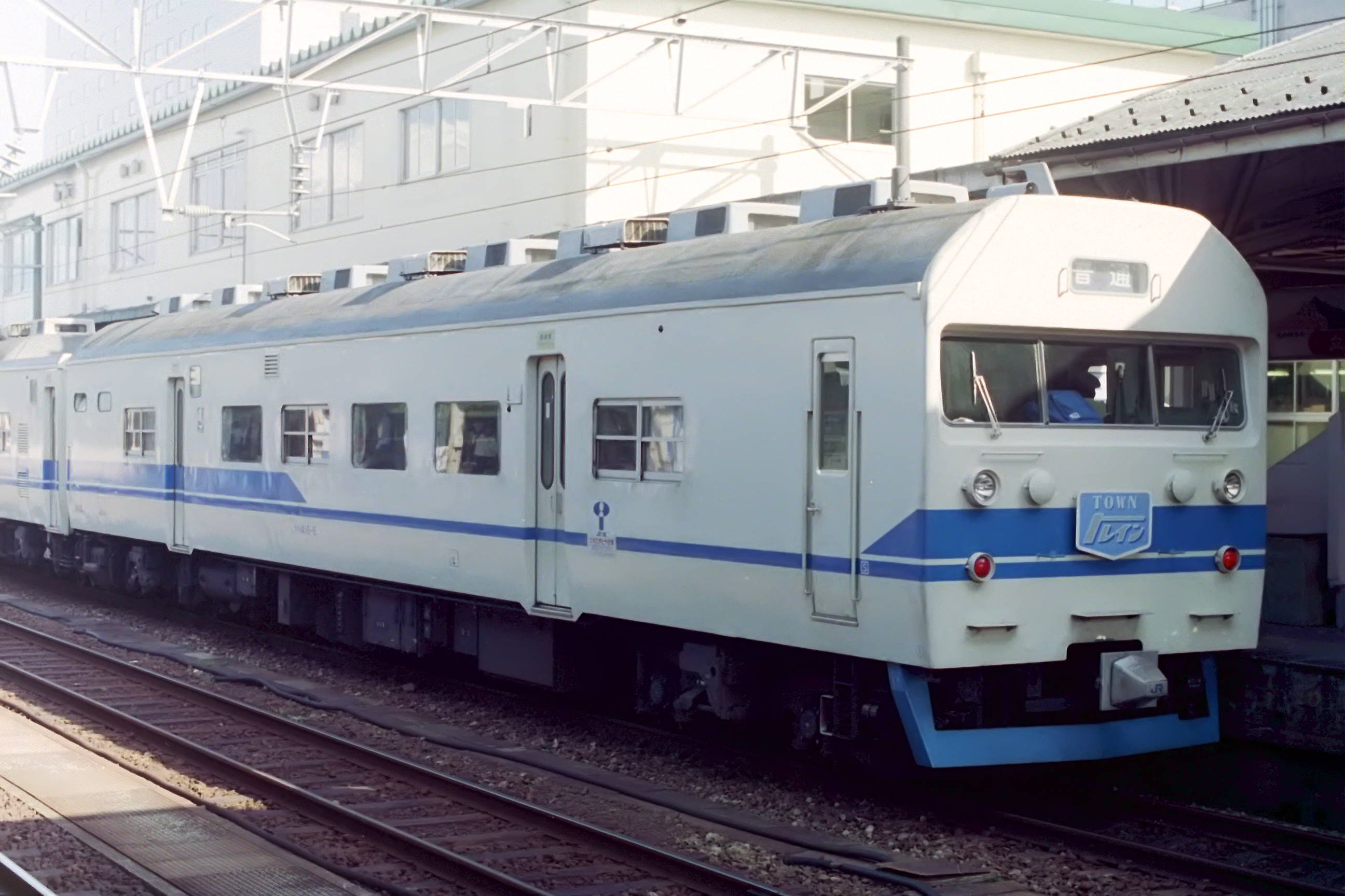 クハ418-5